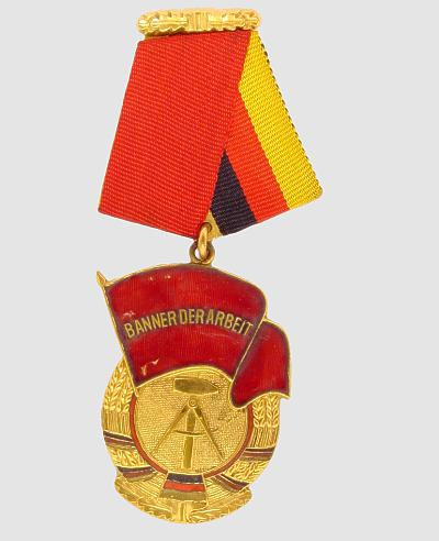 Order Sztandaru Pracy [NRD), odmiana cywilna